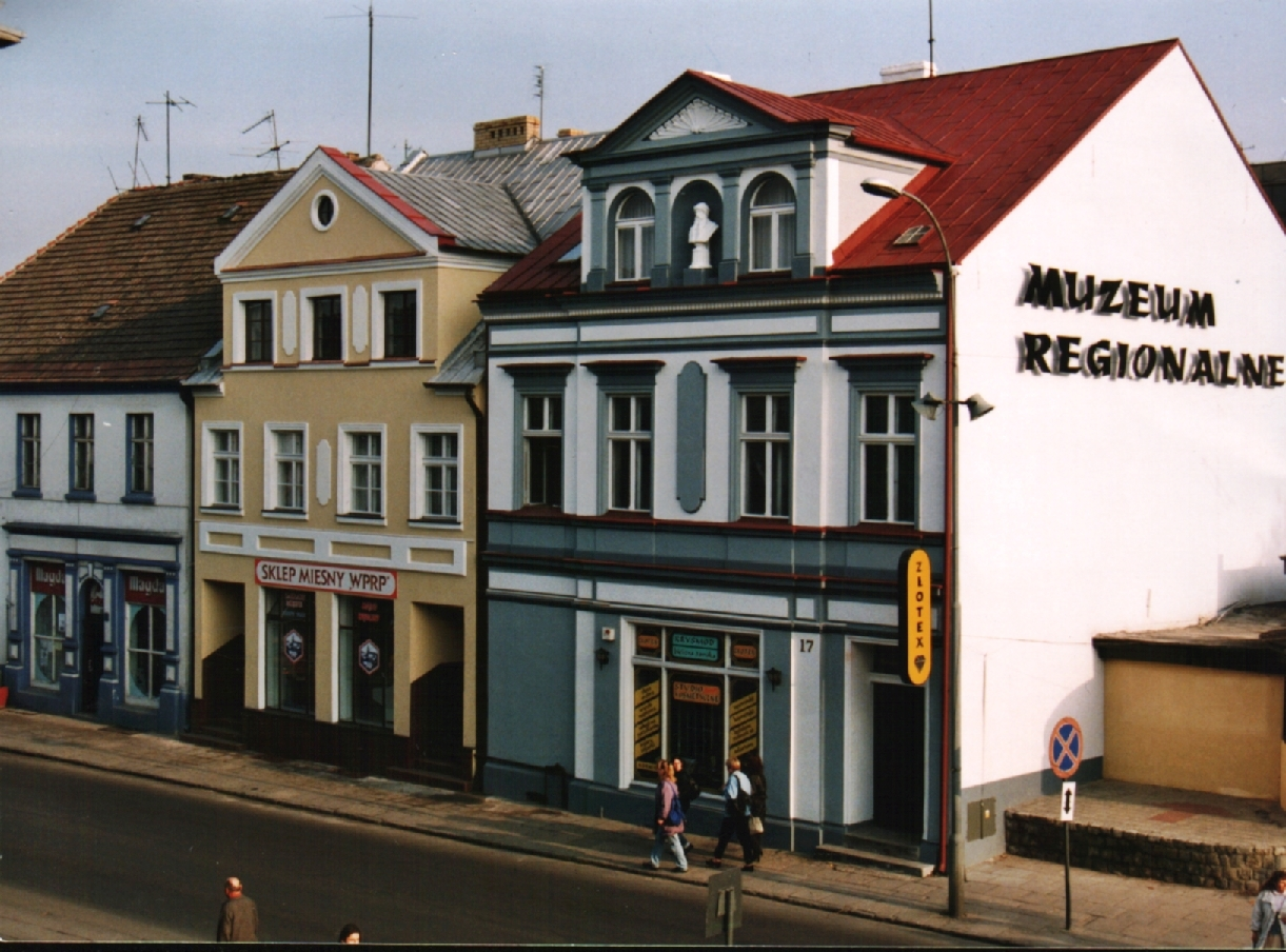 BARLINEK